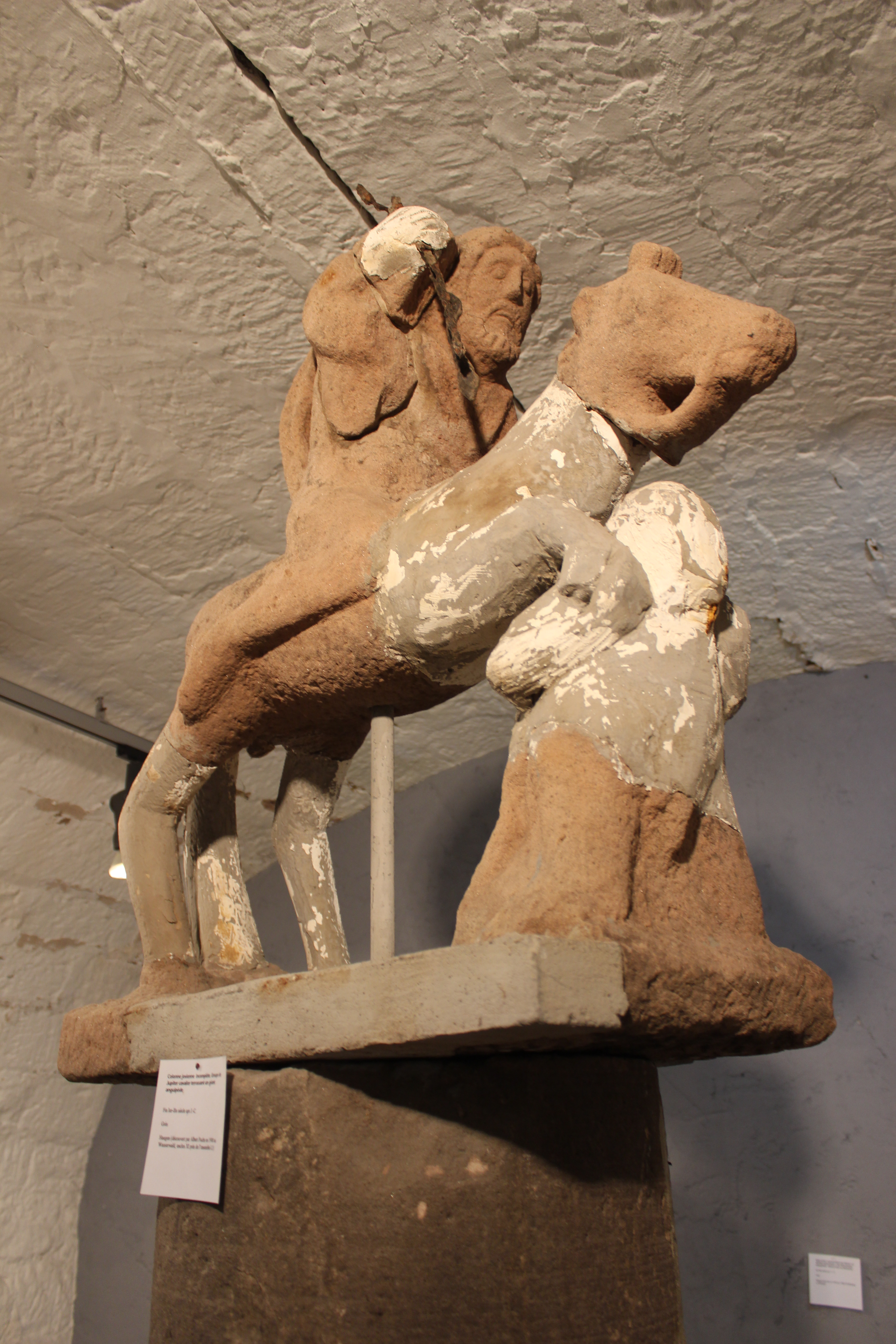 Jupiter à l'anguipede musée saverne